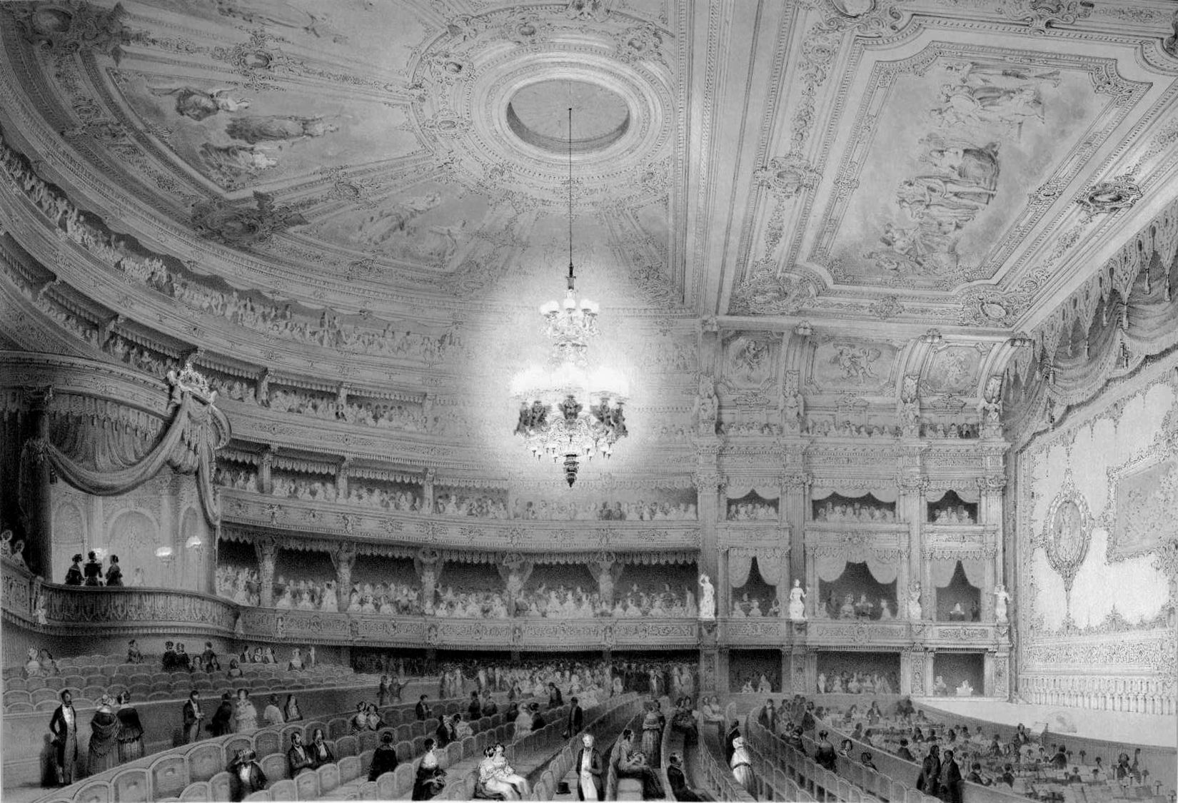 Berlin, Germany: Königliches Opernhaus (Royal Opera House)